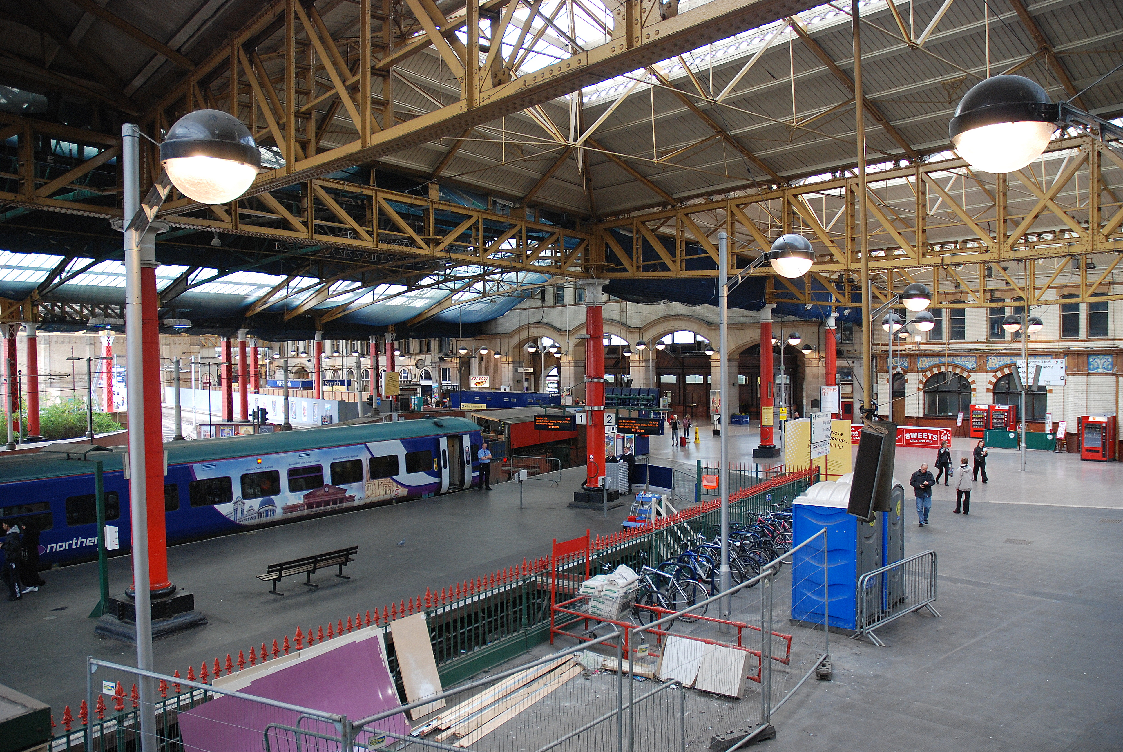 Station Manchester Victoria in Manchester, Engeland